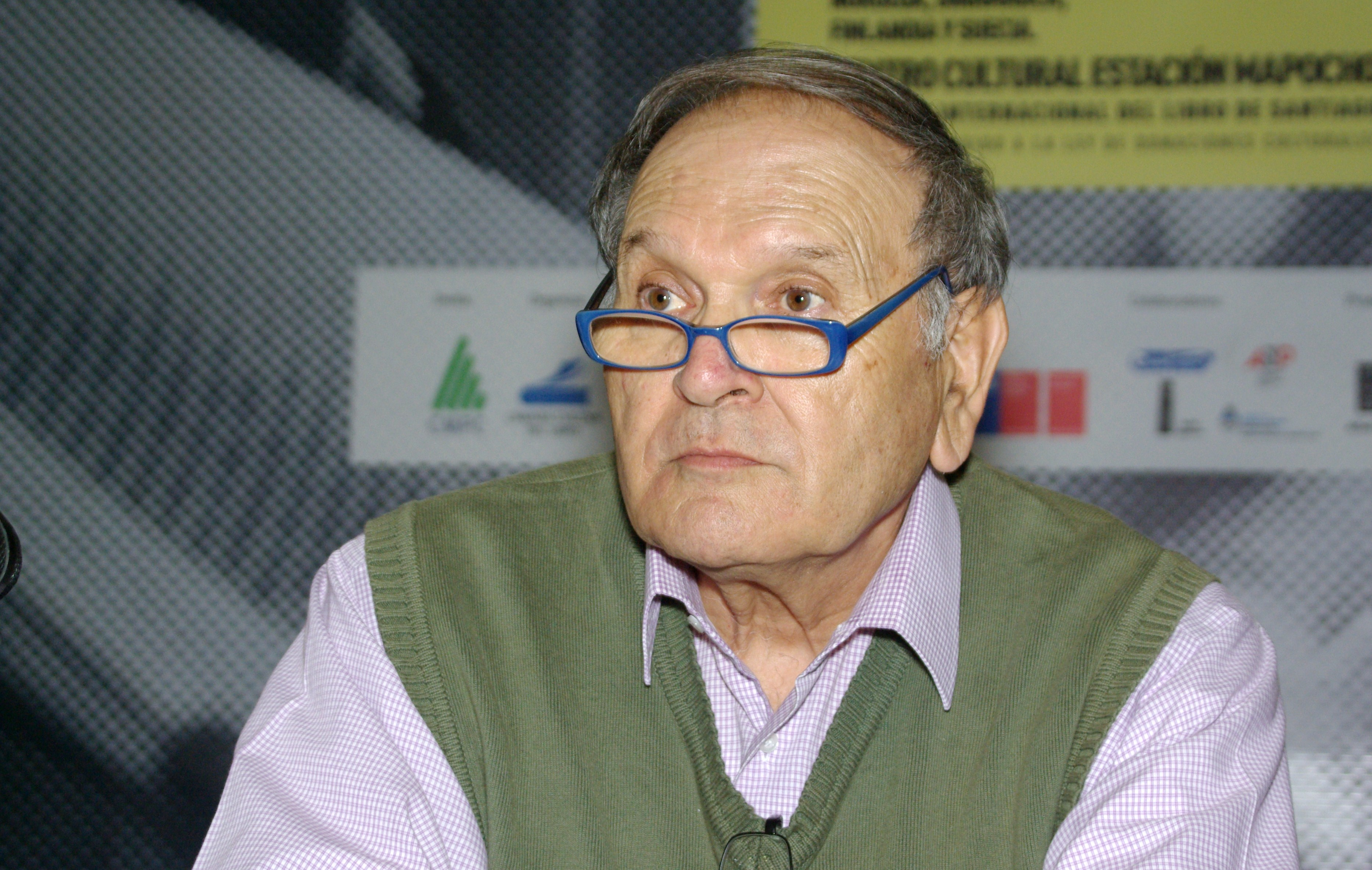 El historiador chileno Jorge Pinto, Premio Nacional 2012, en la Feria Internacional del Libro de Santiago 2015